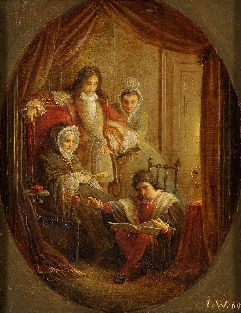 Der Rezitateabend. Öl auf Malkarton, 21 x 17,5 cm